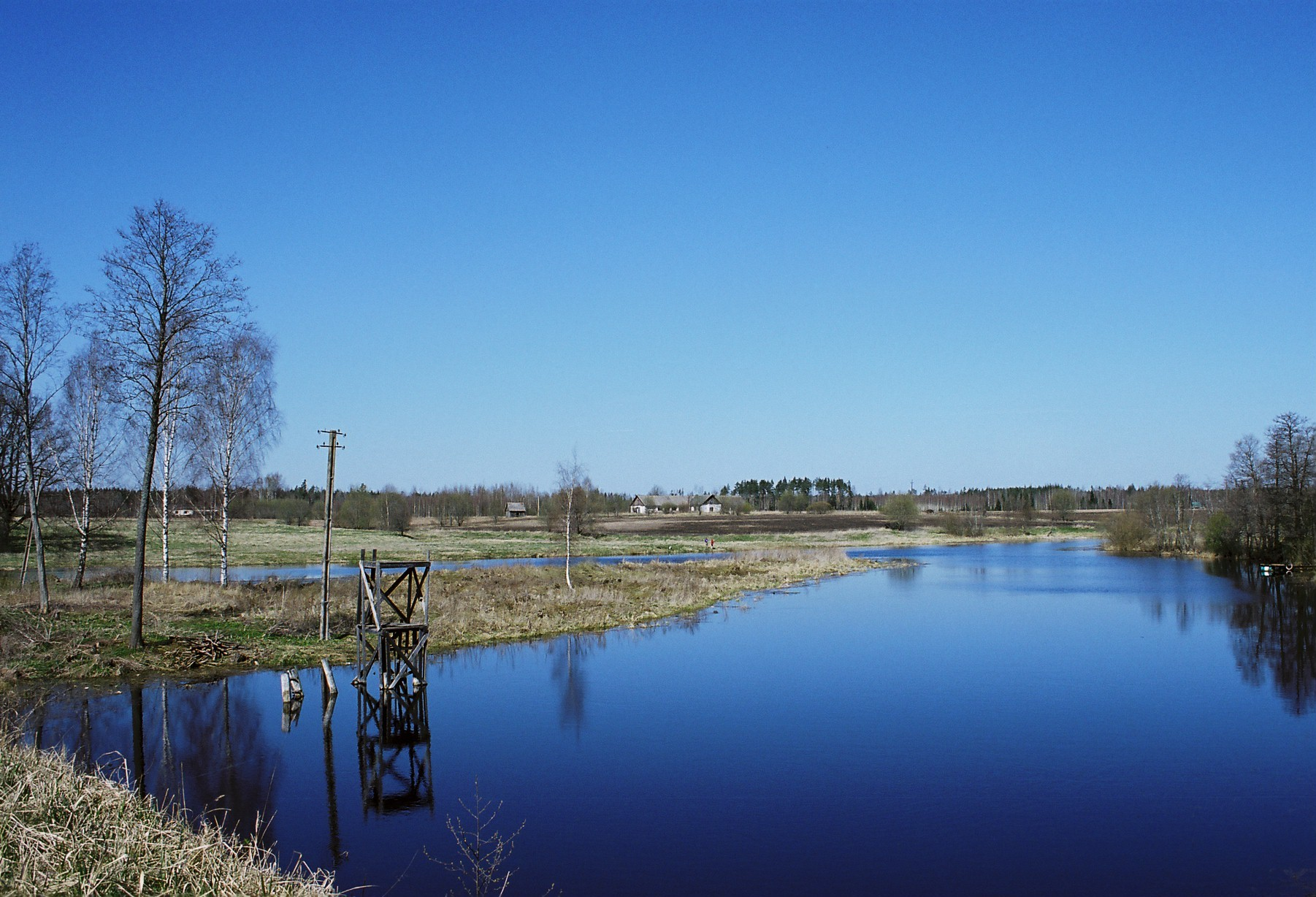 Ahja jõgi alamjooksul (Lääniste külas)